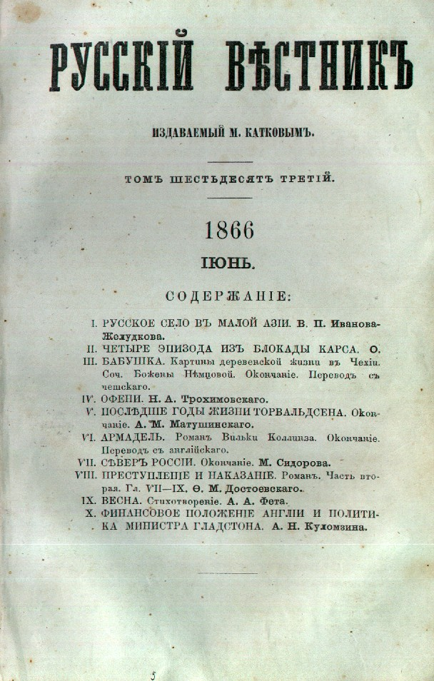 "Русский вестник", обложка журнала